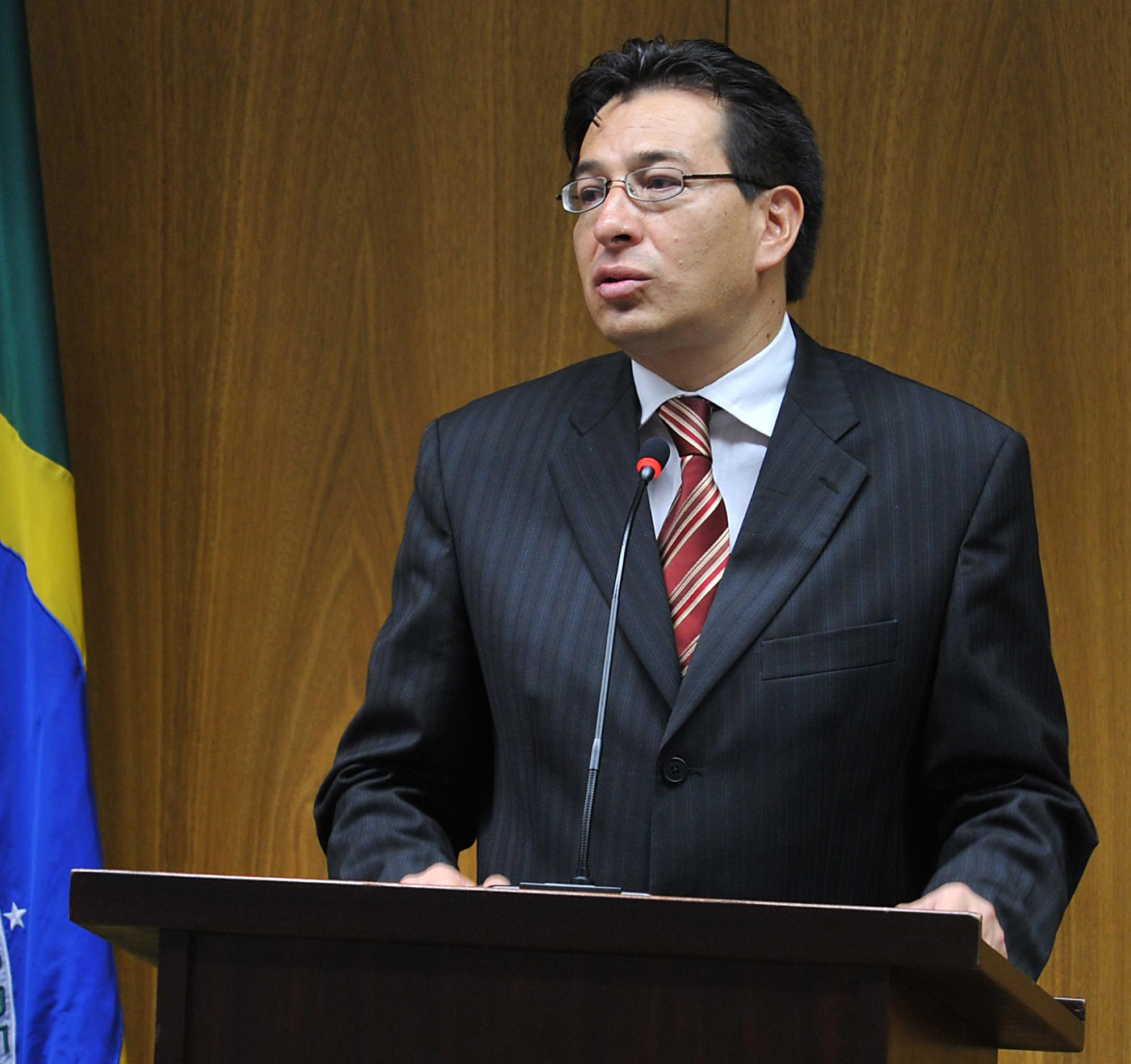 Brasília - O ministro de Relações Exteriores, Comércio e Integração do Equador, Fander Falconí Benítez, fala sobre a possível instalação de bases norte-americanas em território colombiano, durante entrevista coletiva no Itamaraty Foto: Valter Campanato/ABr note: slightly cropped